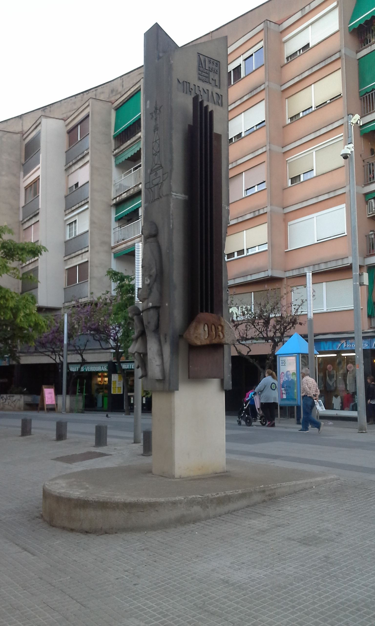 Monument al Mil·lenari de Mollet a la Rambla Nova de Mollet del Vallès (Vallès Oriental).